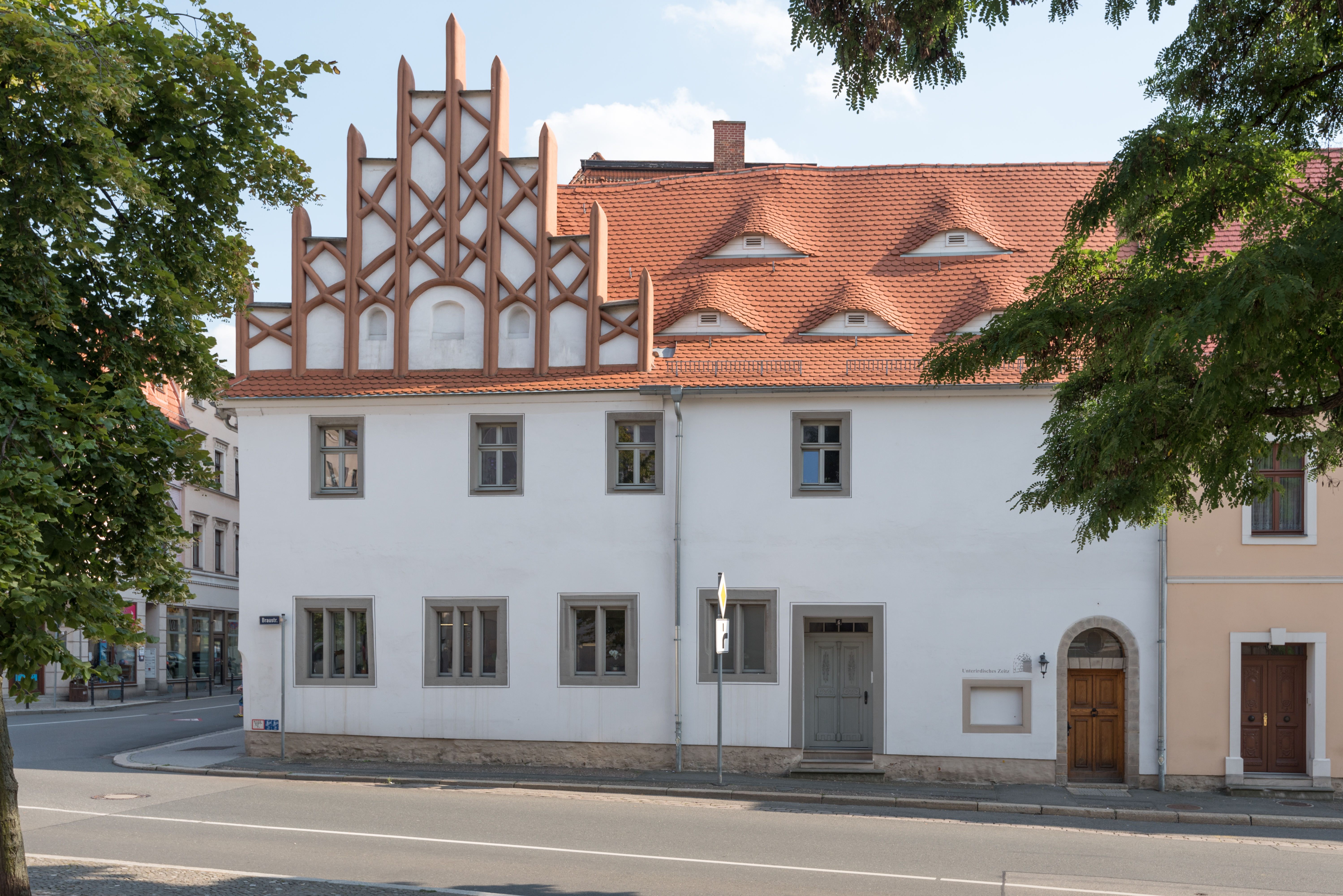 Zeitz, Braustraße 6